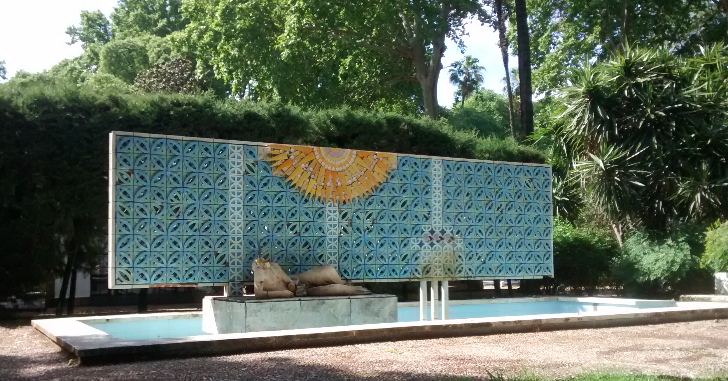 Glorieta de Luis Montoto (Sevilla)